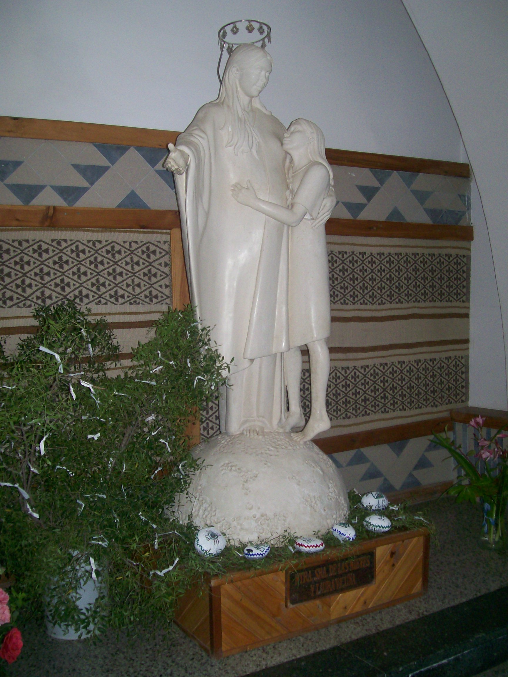 Estatua de Laura Vicuña junto a Nuestra Señora de las Nieves en la iglesia de Junín de los Andes